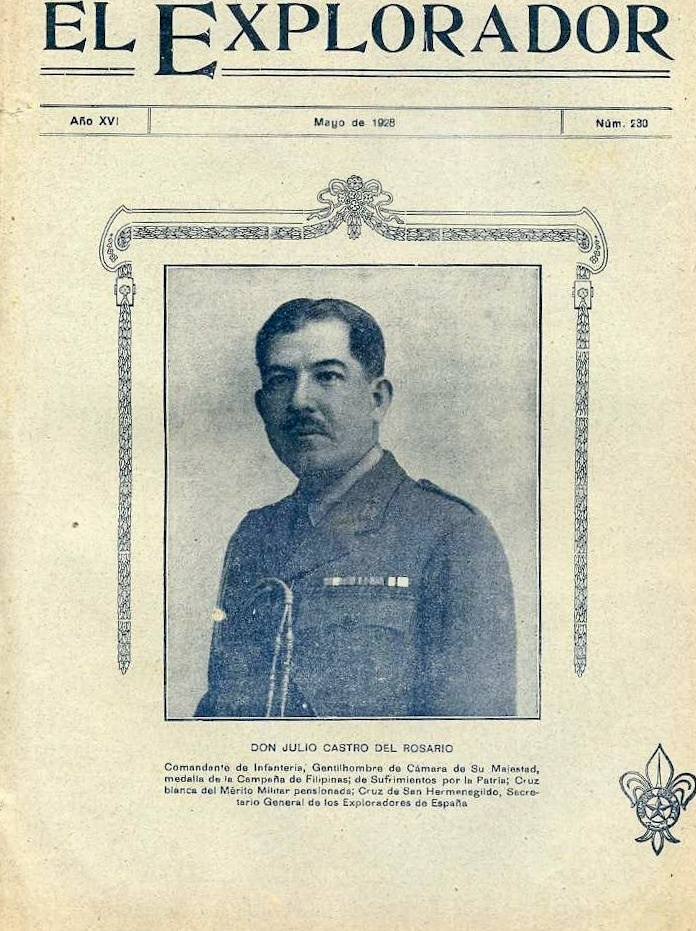 Imagen de D. Julio Castro del Rosario, secretario general de Exploradores de España. Revista El Explorador, No. 230, mayo de 1928